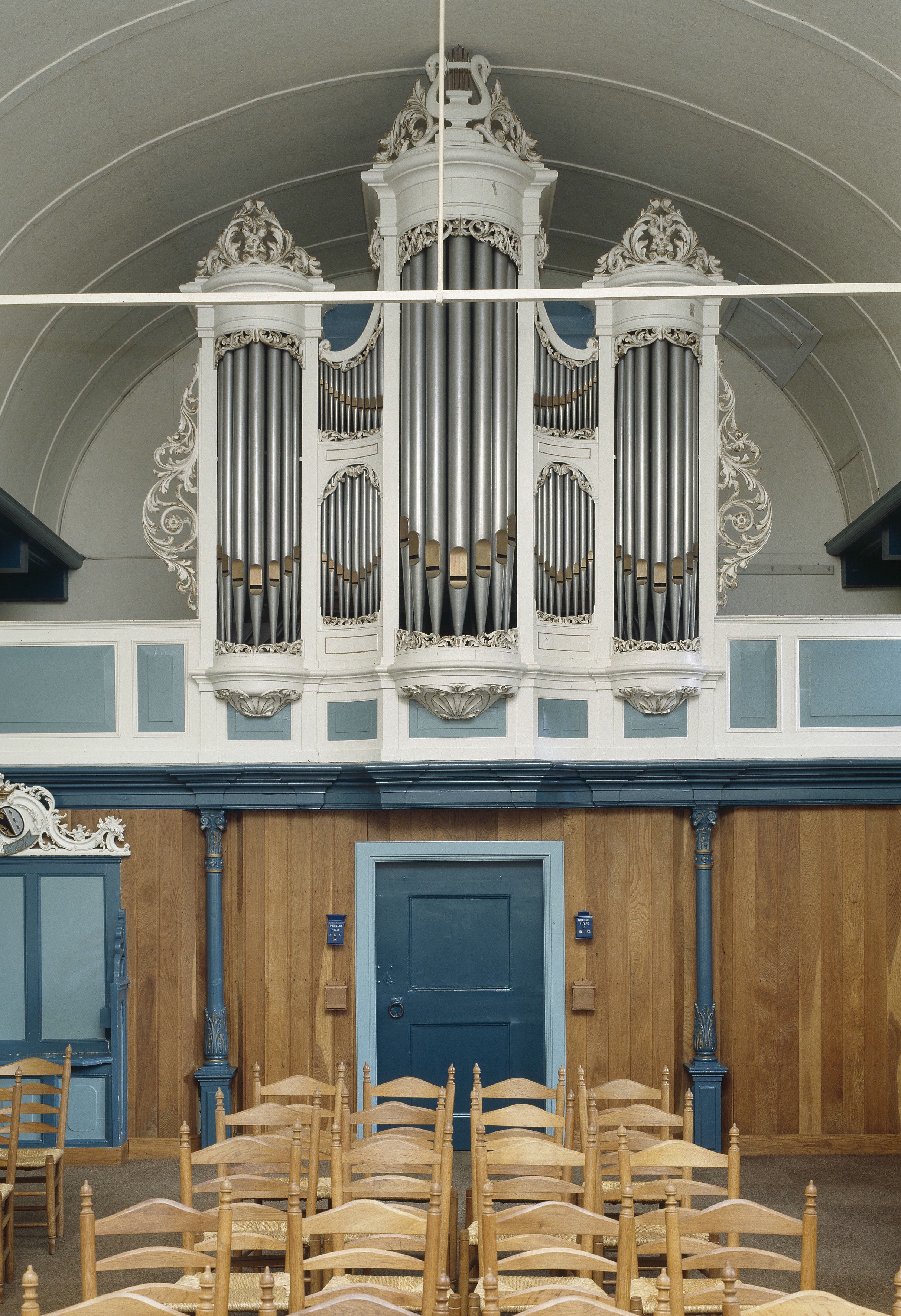 Doopsgezinde Kerk: Interieur -Damwoude, (Dantumawoude) Doniaweg 34 - Doopsgezinde Vermaning - aanzicht orgel, orgelnummer 282 (opmerking: Gefotografeerd voor Het Historische Orgel in Nederland 1878-1886, Bladzijde 341)